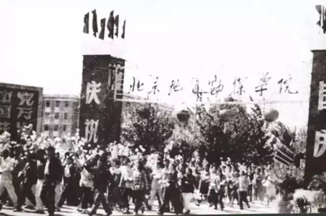 北京地质勘探学院（今中国地质大学）校门。